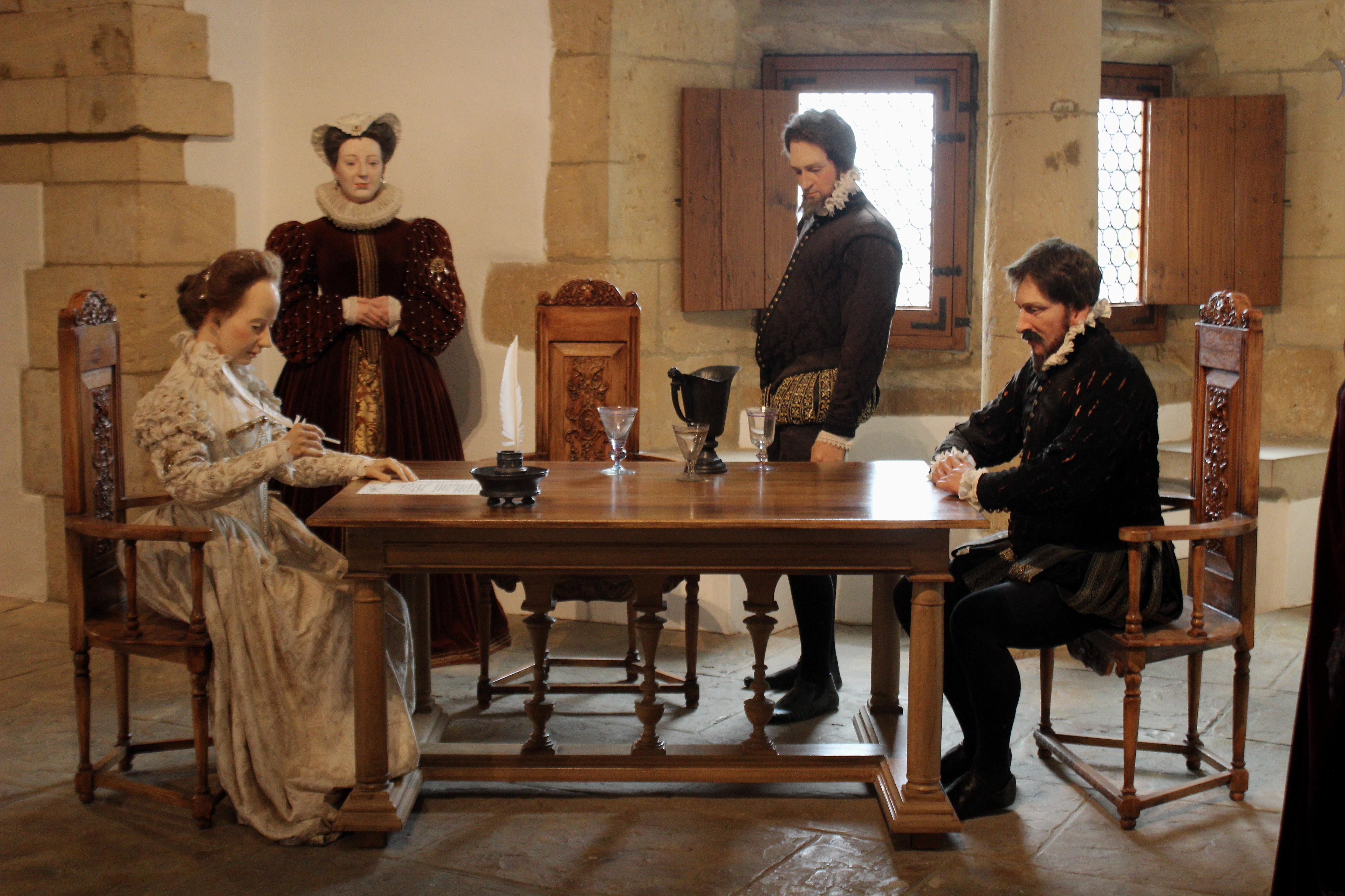 Château de sedan, Ardennes, France